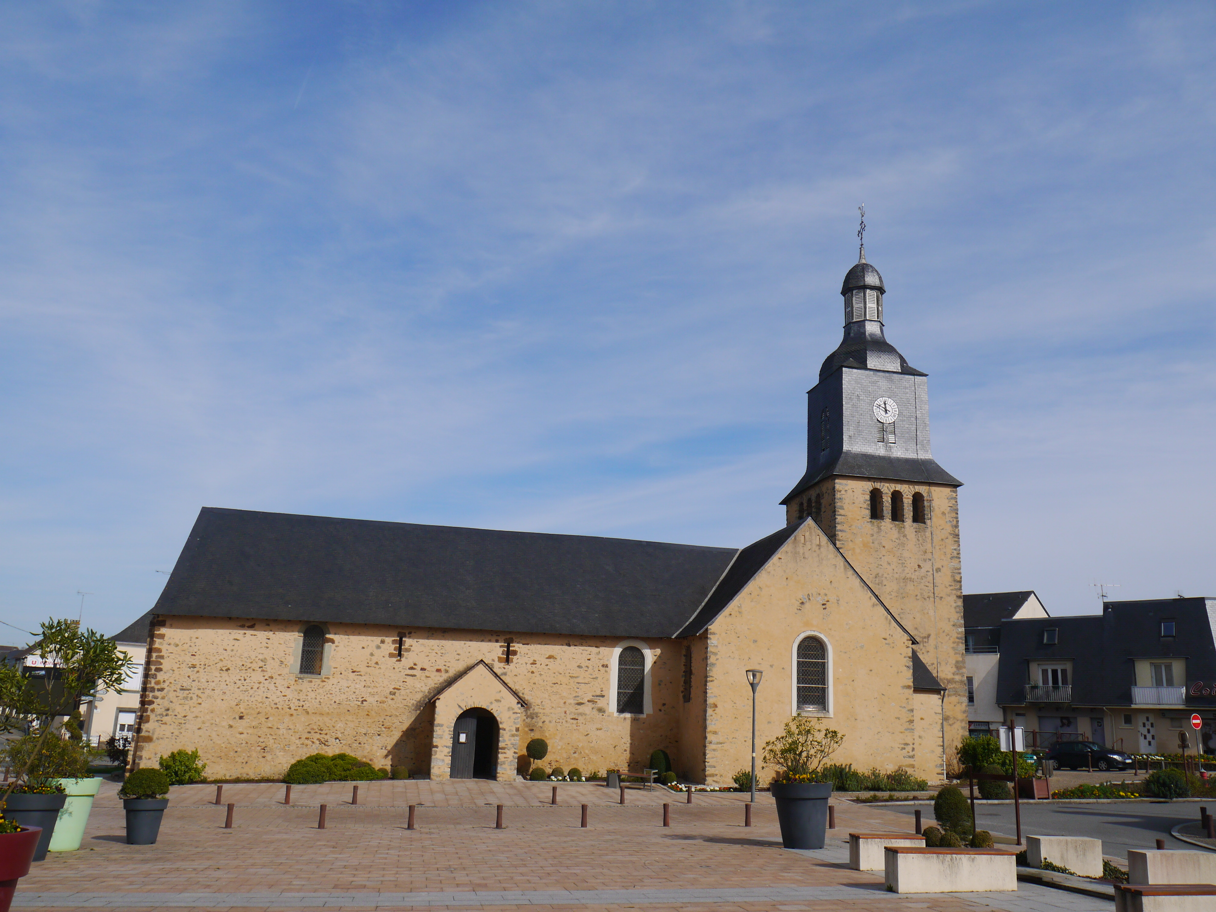 L'église Saint-Siméon en 2017.